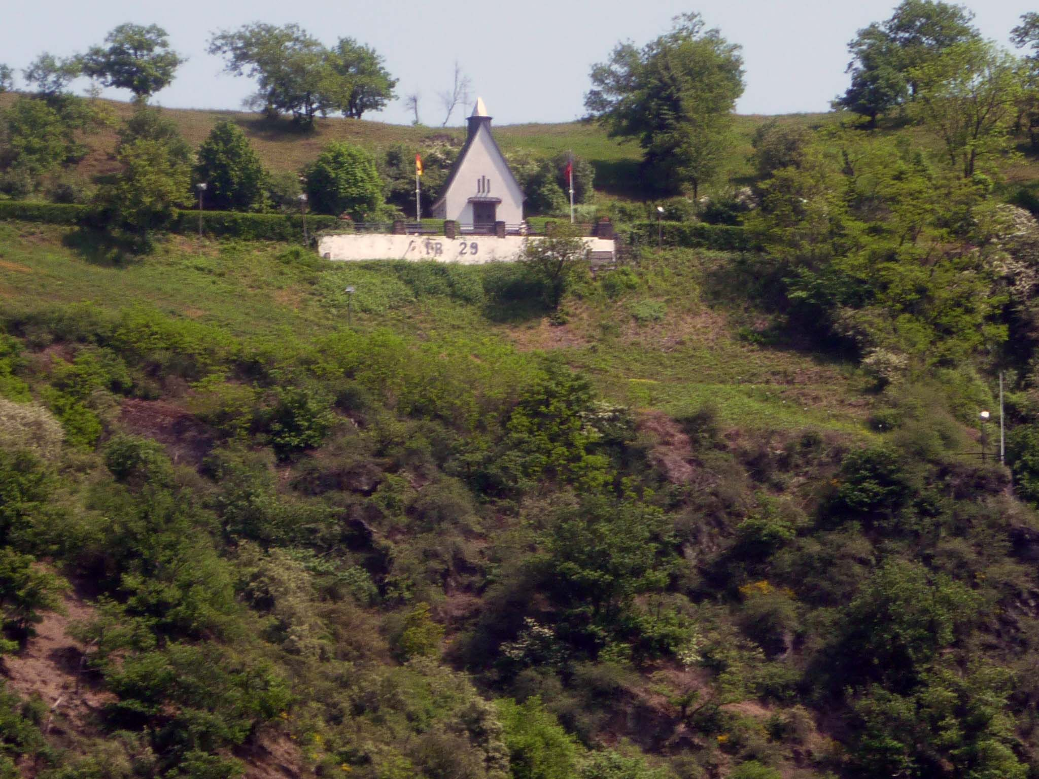 Mahnmal des IR 29 in Rheinbrohl von Brohl aus gesehen